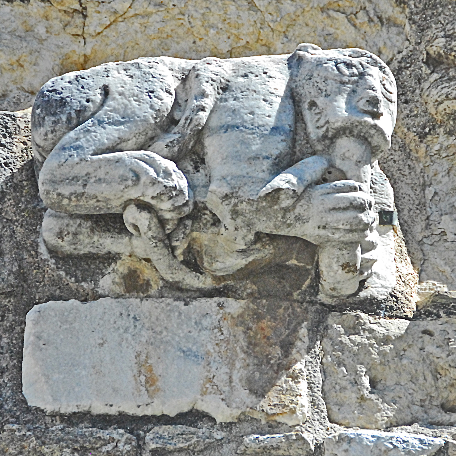 St-André-de-Sorède, fressender Löwe links